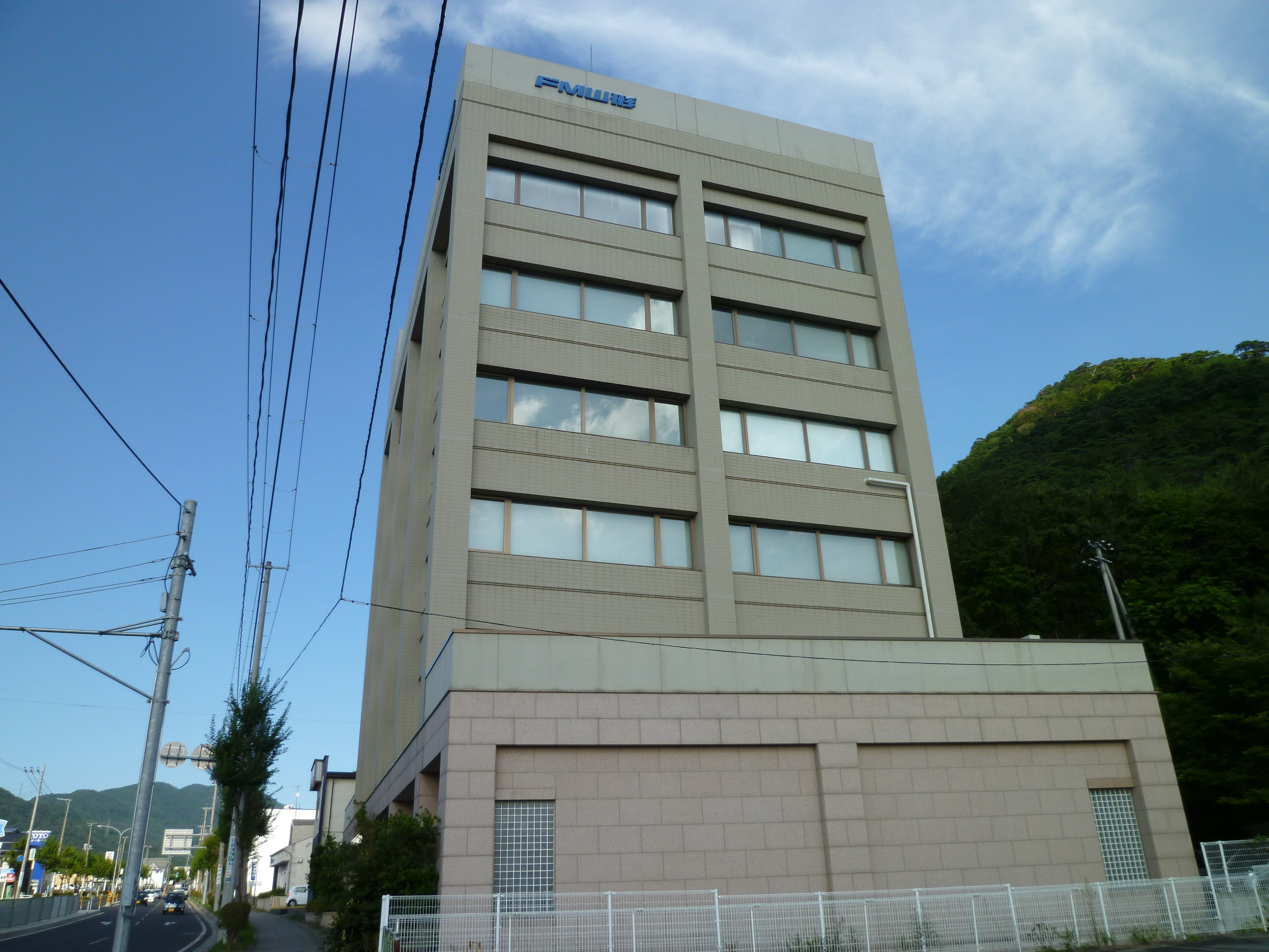 FM山形本社屋